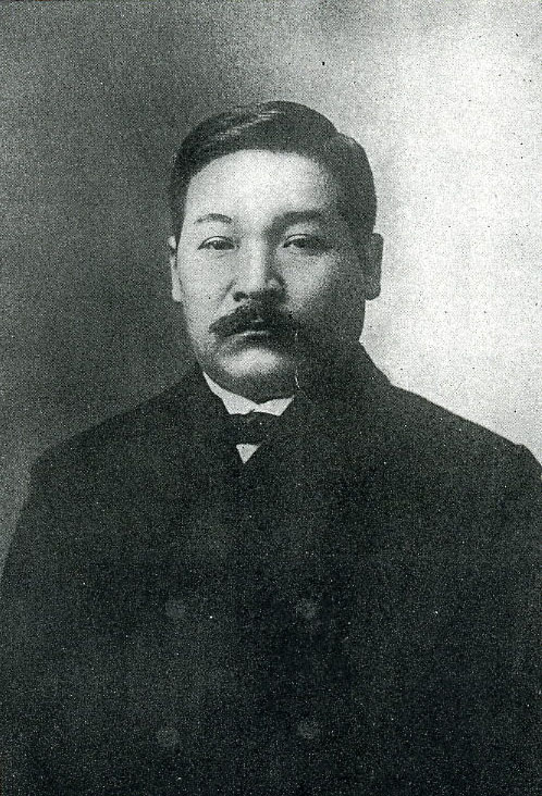 茂庄五郎（1863-1913、関西で活躍した建築家）肖像写真